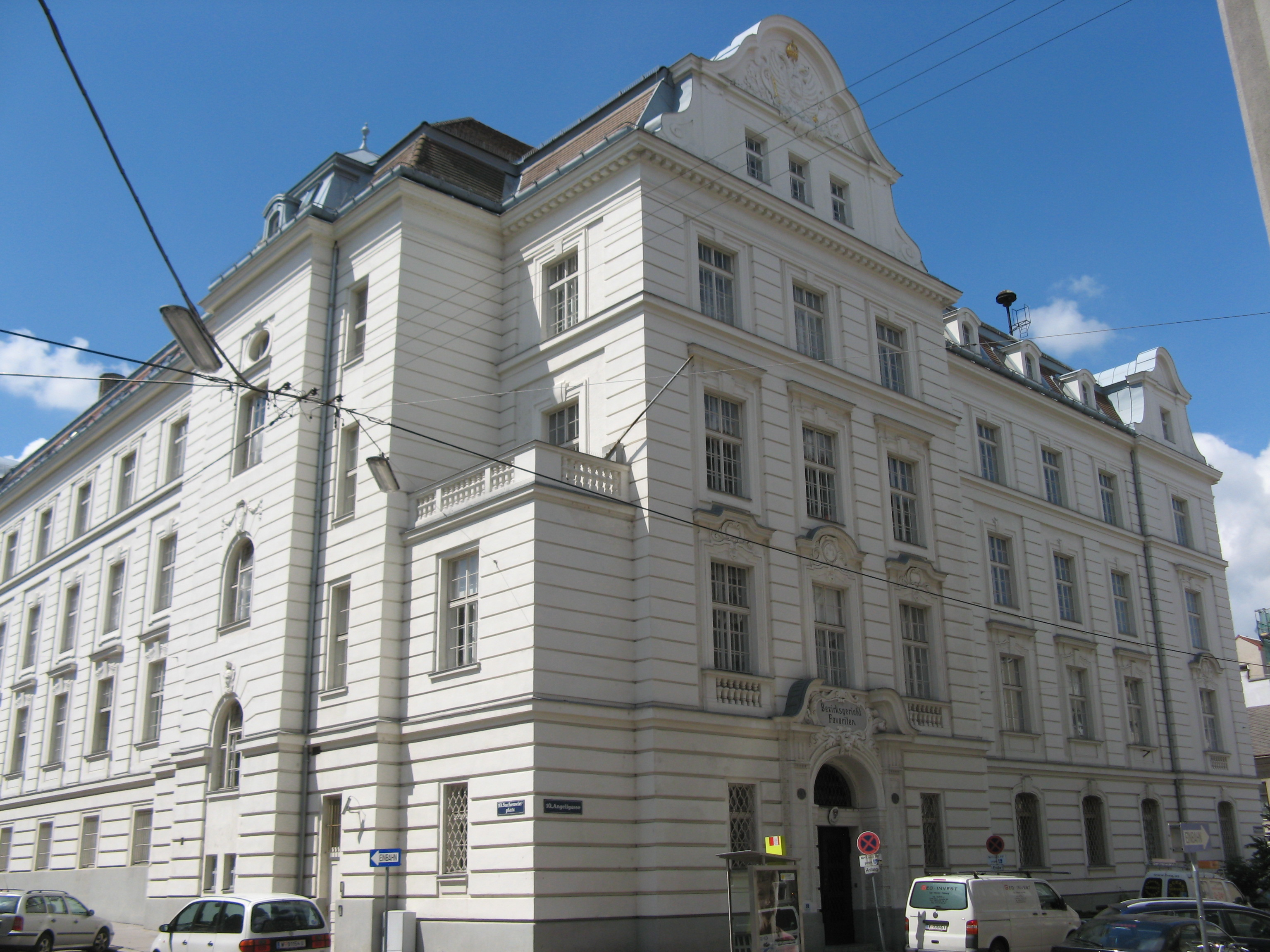 Bezirksgericht Favoriten (1912-14), Angeligasse 33-35, Wien-Favoriten